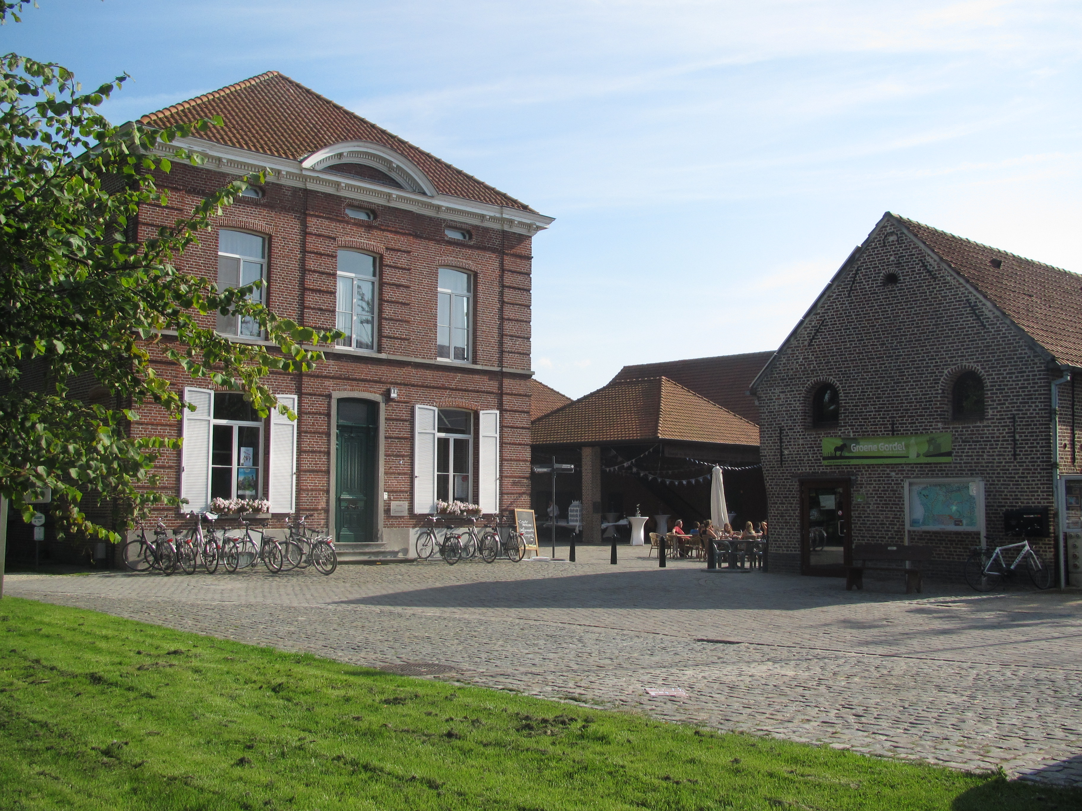 Hof Ten Hemelrijk, gelegen aan de Kloosterstraat, is het gemeenschapscentrum van de gemeente Opwijk.